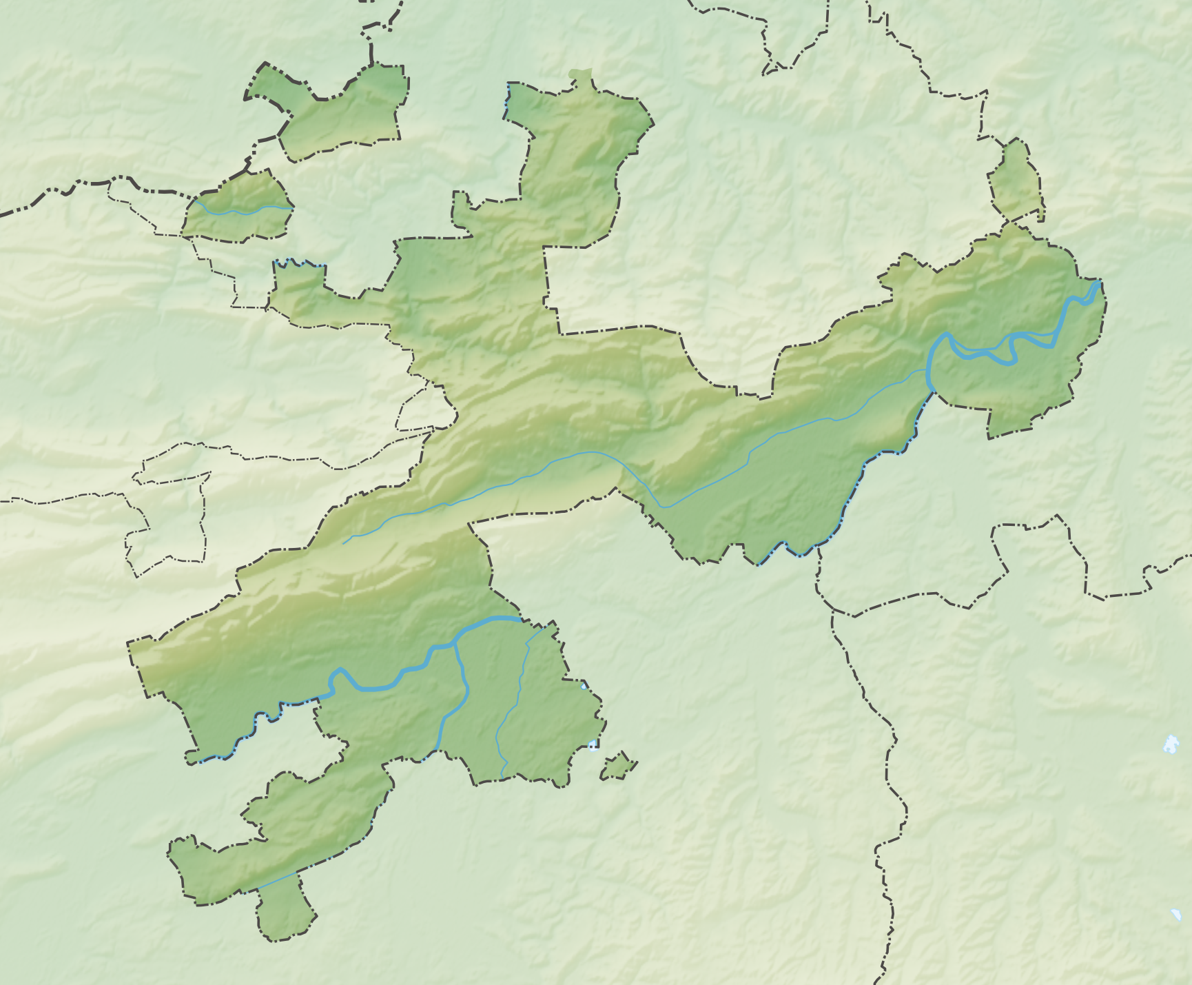 Reliefkarte des Kantons Solothurn Topographischer Hintergrund: NASA Shuttle Radar Topography Mission (public domain). SRTM3 v.2.